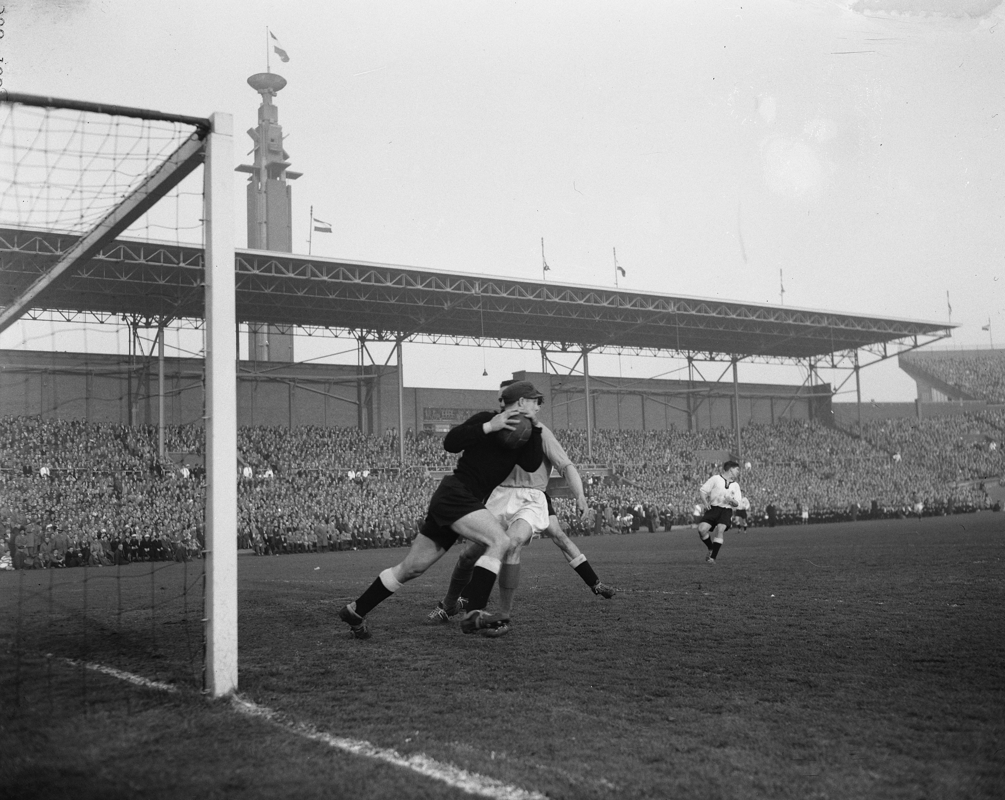 Collectie / Archief : Fotocollectie Anefo Reportage / Serie : [ onbekend ] Beschrijving : Voetbal Nederland tegen Duitsland in Olympisch Stadion Amsterdam. Tilkowski Datum : 3 april 1957 Locatie : Amsterdam, Noord-Holland Trefwoorden : sport, voetbal Instellingsnaam : Olympisch Stadion Fotograaf : Noske, J.D. / Anefo Auteursrechthebbende : Nationaal Archief Materiaalsoort : Negatief (zwart/wit) Nummer archiefinventaris : bekijk toegang 2.24.01.04 Bestanddeelnummer : 908-4689